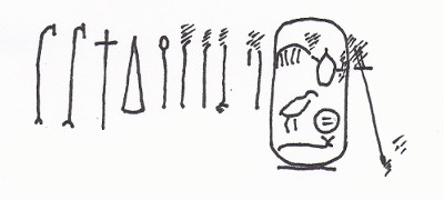 Steinbruchinschrift auf einem "Backing Stone" der Cheops-Pyramide (4. Steinlage) mit dem Namen des Cheops. Zeichnung nach Georges Goyon, Les inscriptions et graffiti des Voyageurs sur la Grande Pyramide. Kairo, 1944, Divers 23.